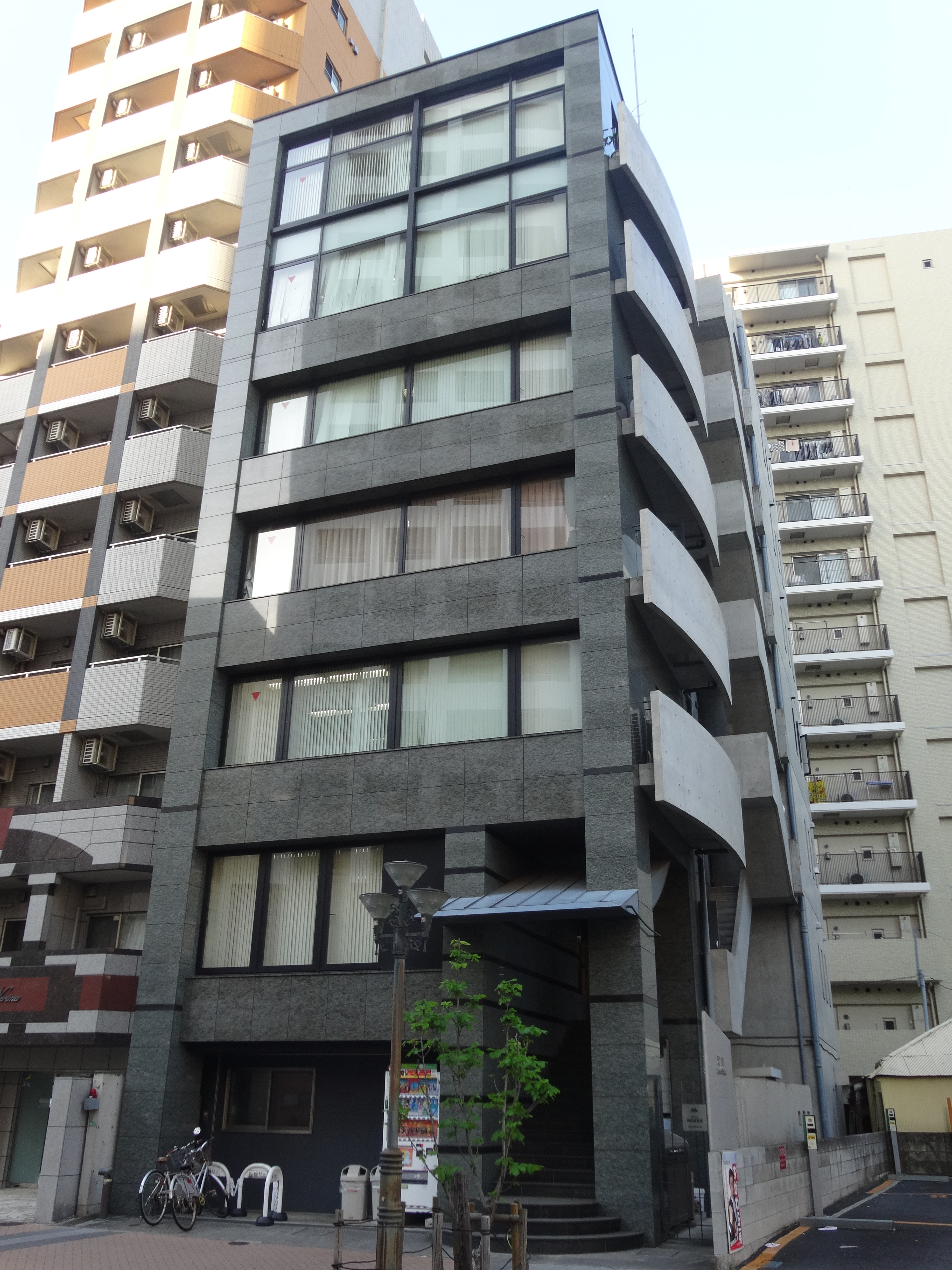 東京都練馬区豊玉北に所在するビル・光音ビル。アニメ制作会社のスタジオ雲雀とラークスエンタテインメントが入居している。